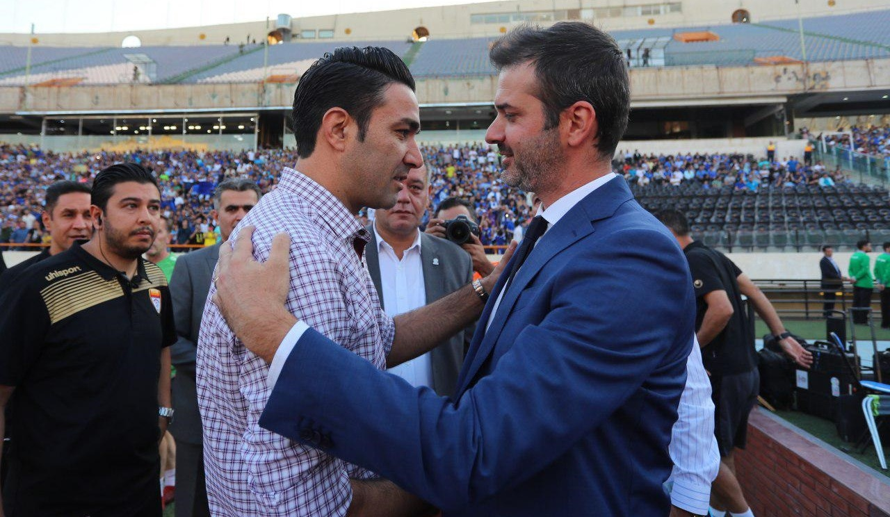 نگاره‌ای از گزارش تصویری دیدار تیم‌های استقلال و فولاد